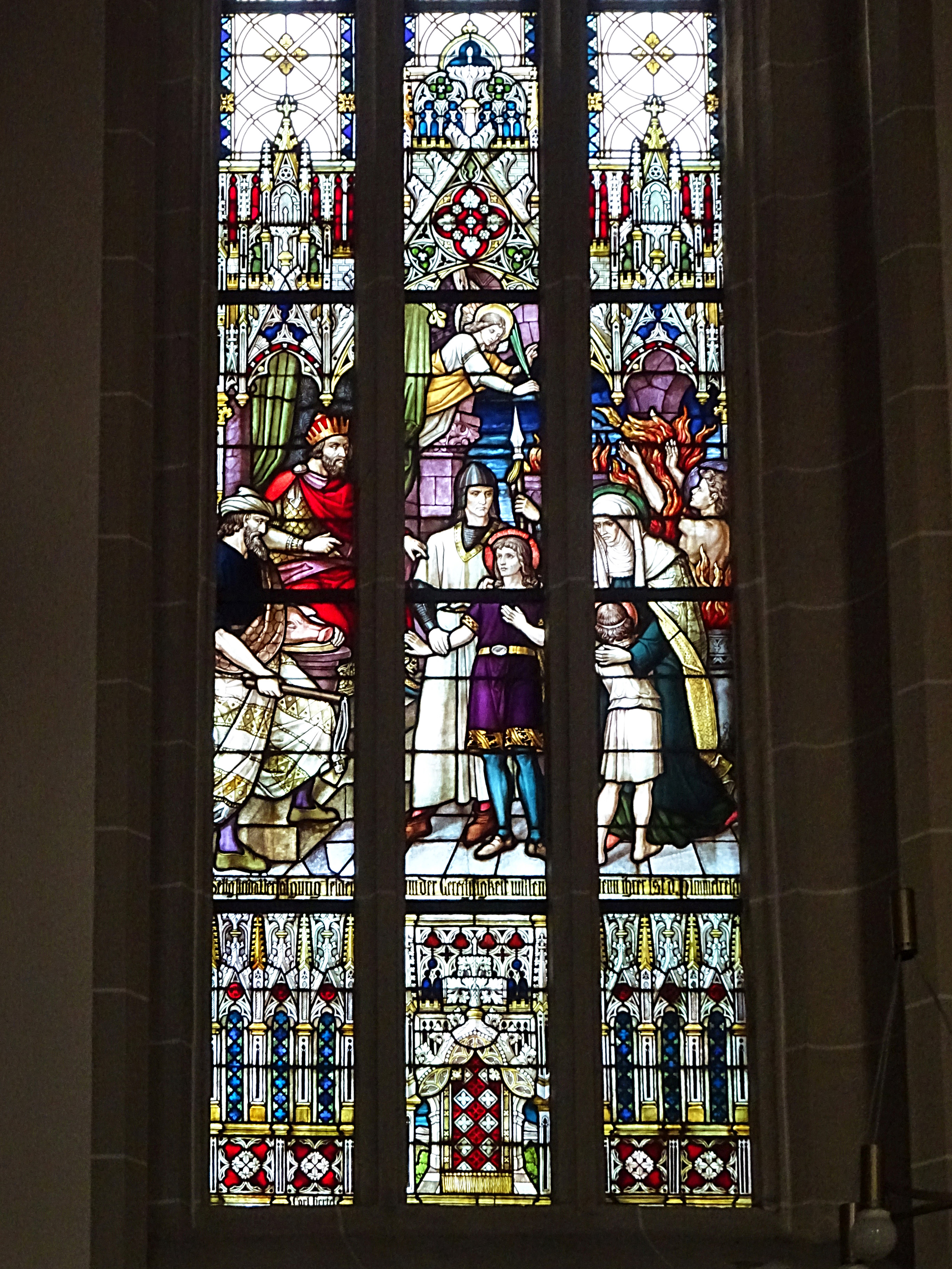 Buntglasfenster in der Pfarrkirche St. Gertrud (Dingelstädt) 8. Selig, die Verfolgung leiden, denn ihnen gehört das Himmelreich / Das Martyrium der Makkabäischen Brüder